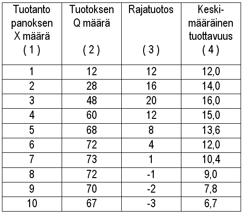 Tuotantofunktion numeerinen kuvaus